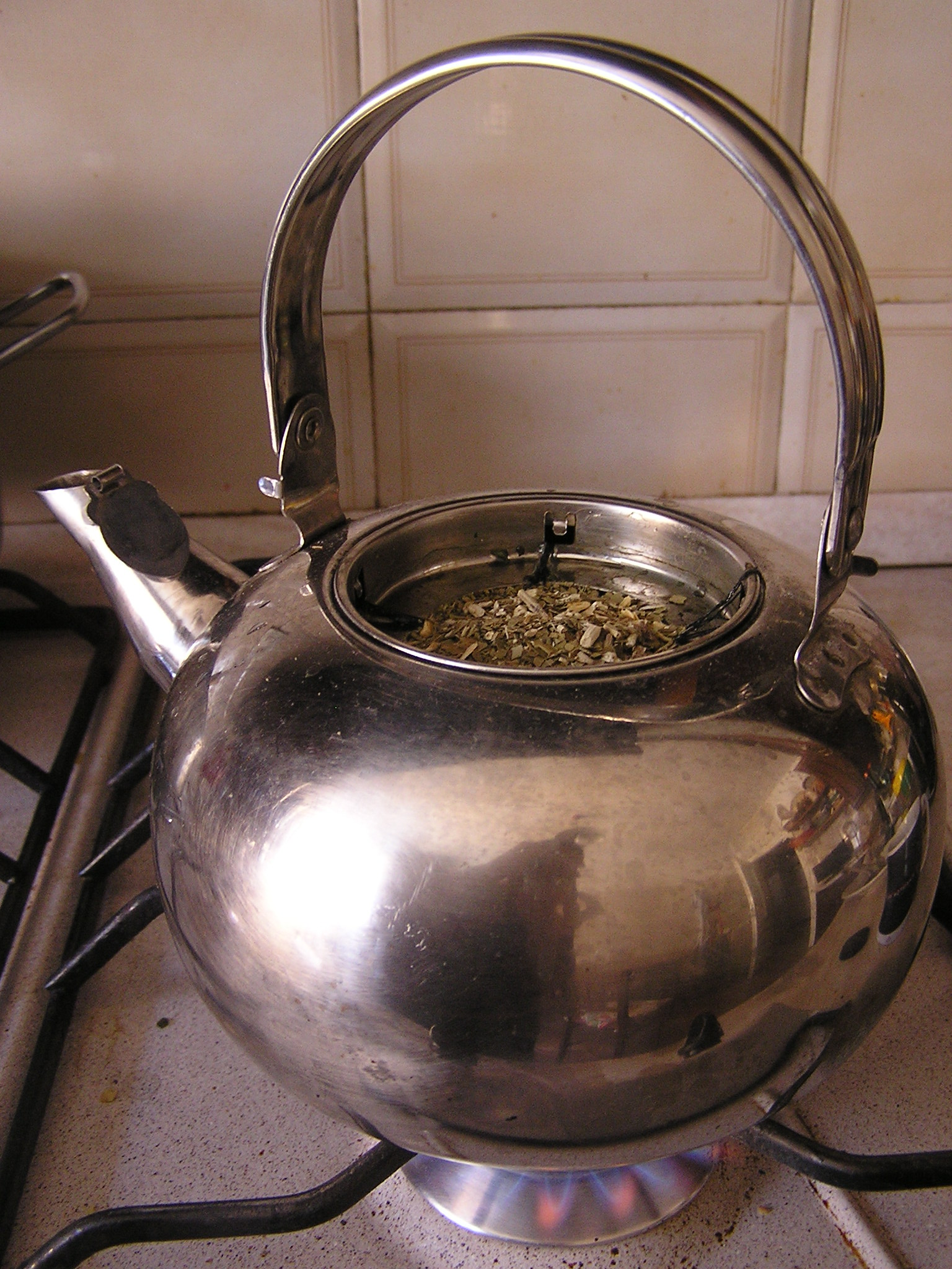 Una teiera con filtro per la preparazione del mate come se fosse tè.